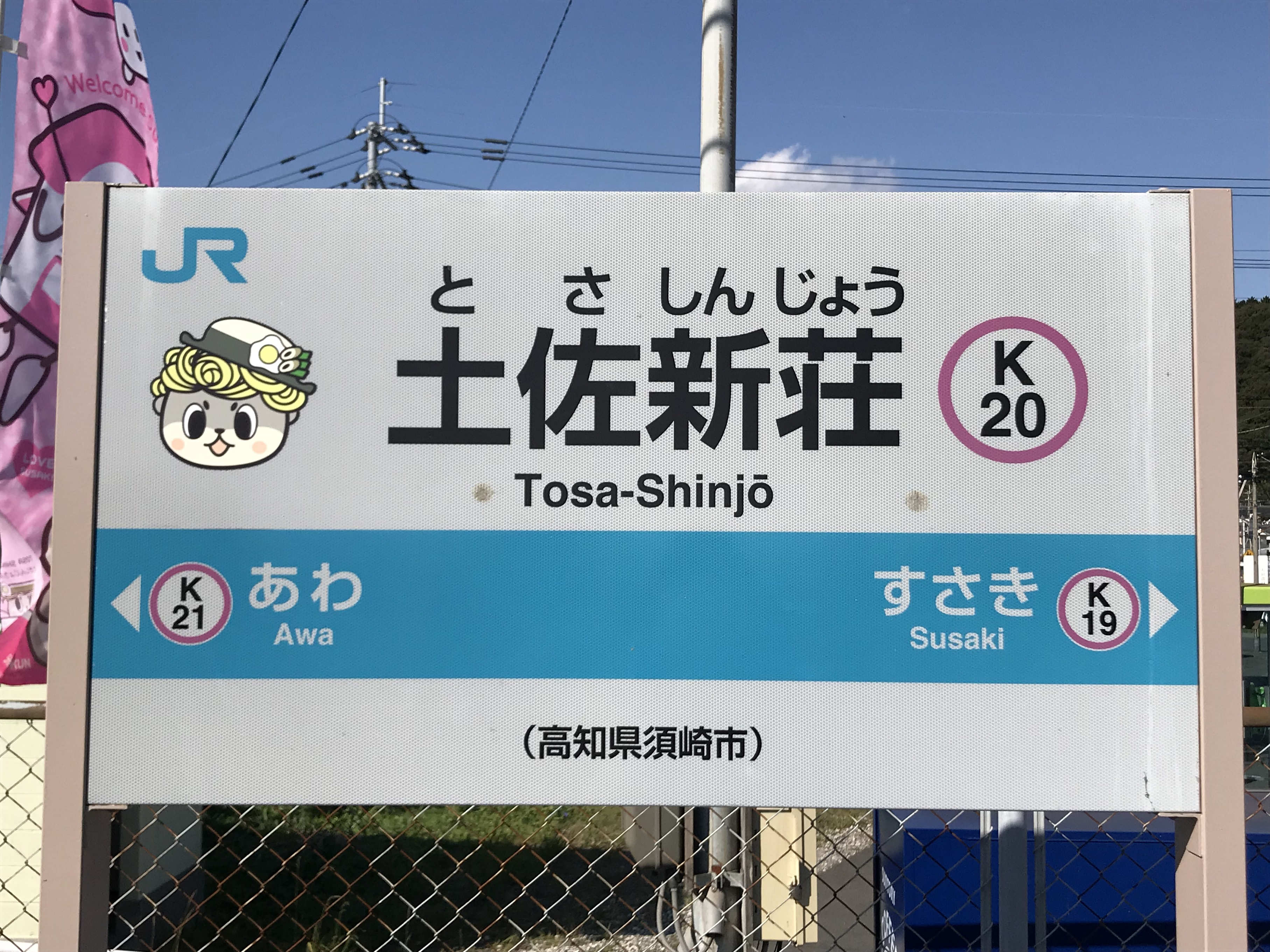 高知県須崎市 土佐新荘駅